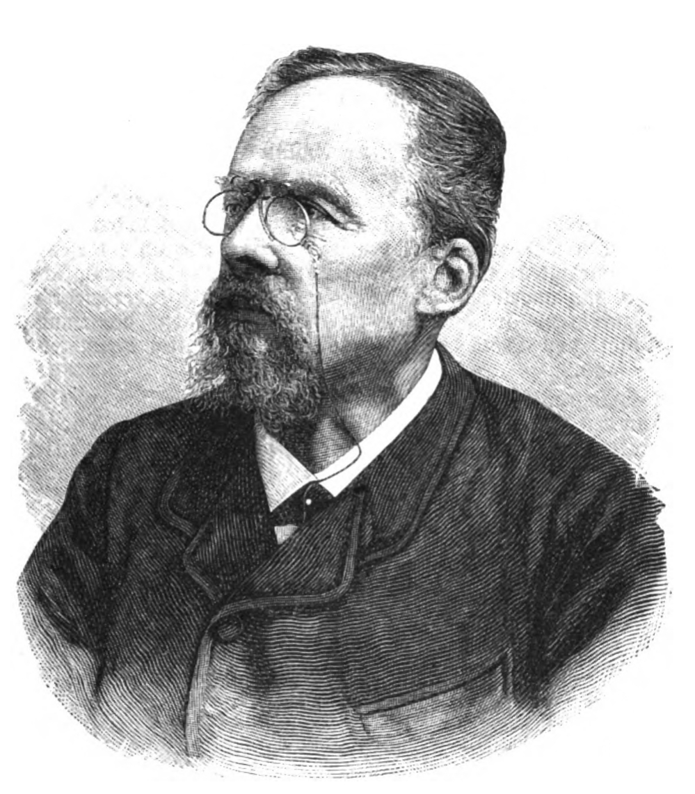 Dr. Karl Vogel. In: Deutsche Rundschau für Geographie und Statistik, Band 14. S. 139 Veröffentlicht 1892